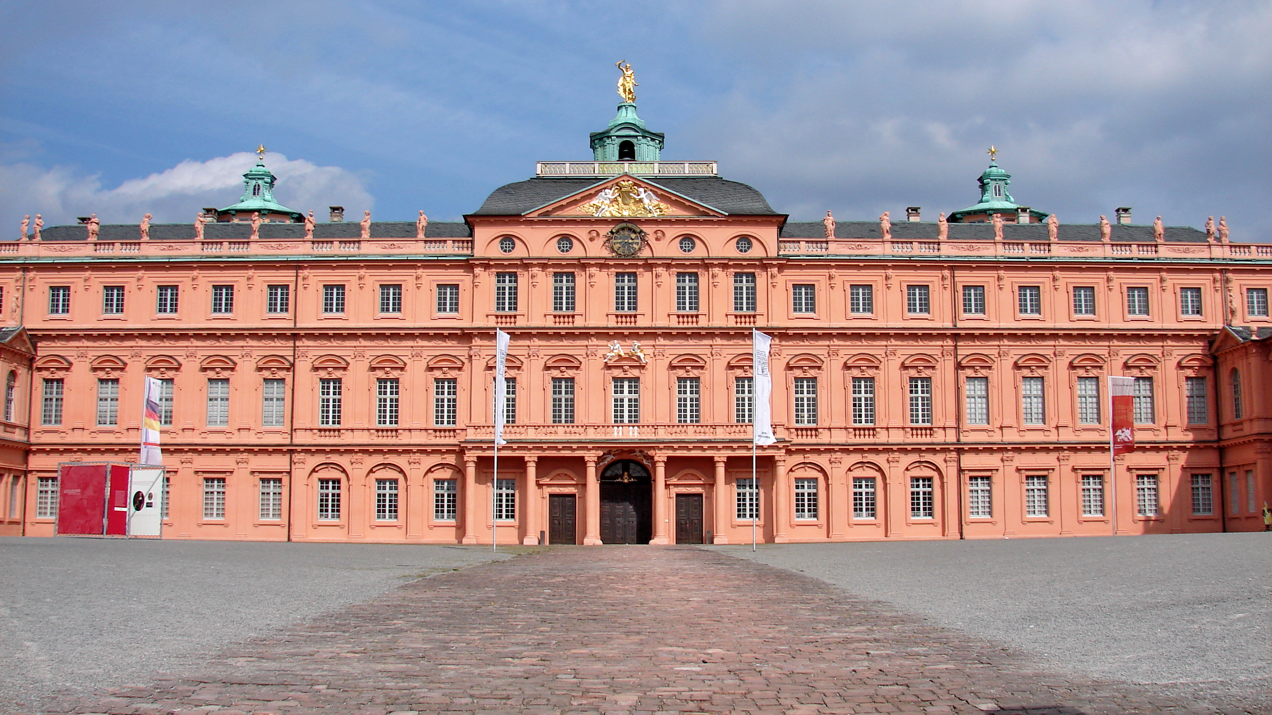 Das Schloss Rastatt (auch Barockresidenz) in Rastatt ist ein ehemaliges Residenzschloss der Markgrafen von Baden-Baden.